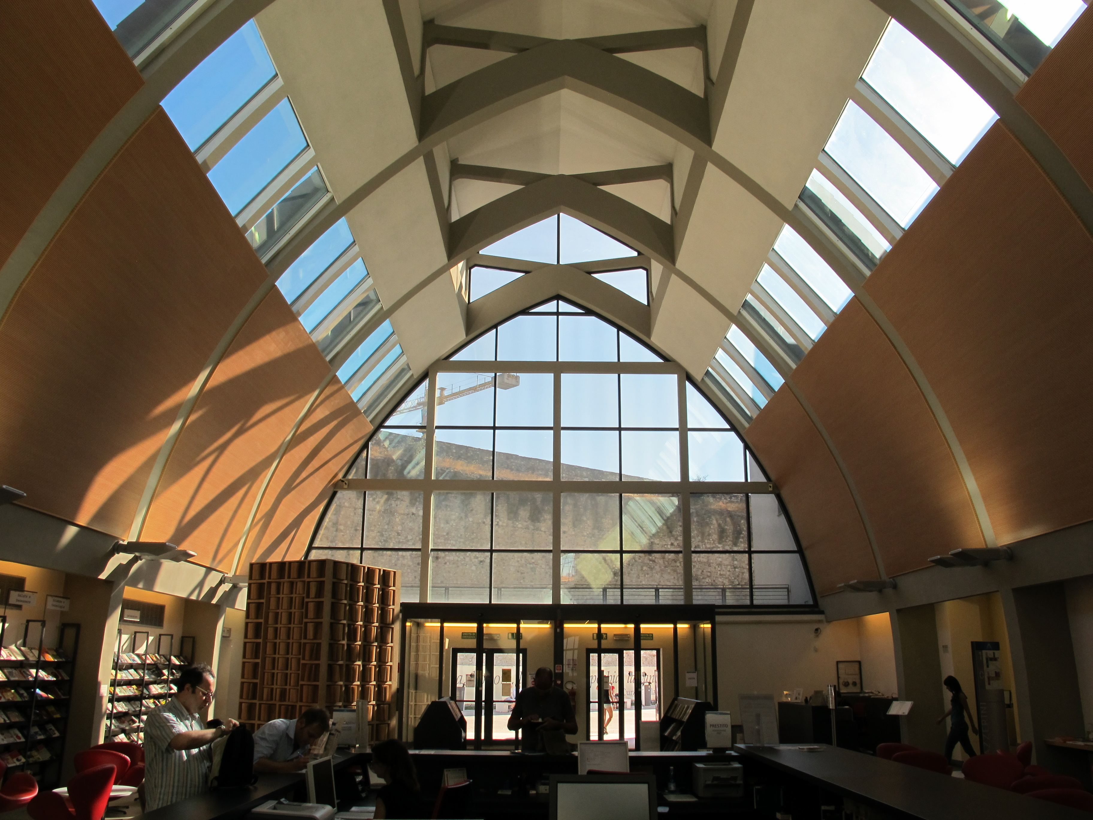 Biblioteca Lazzerini (ex fabbrica Campolmi) This is a photo of a monument which is part of cultural heritage of Italy.